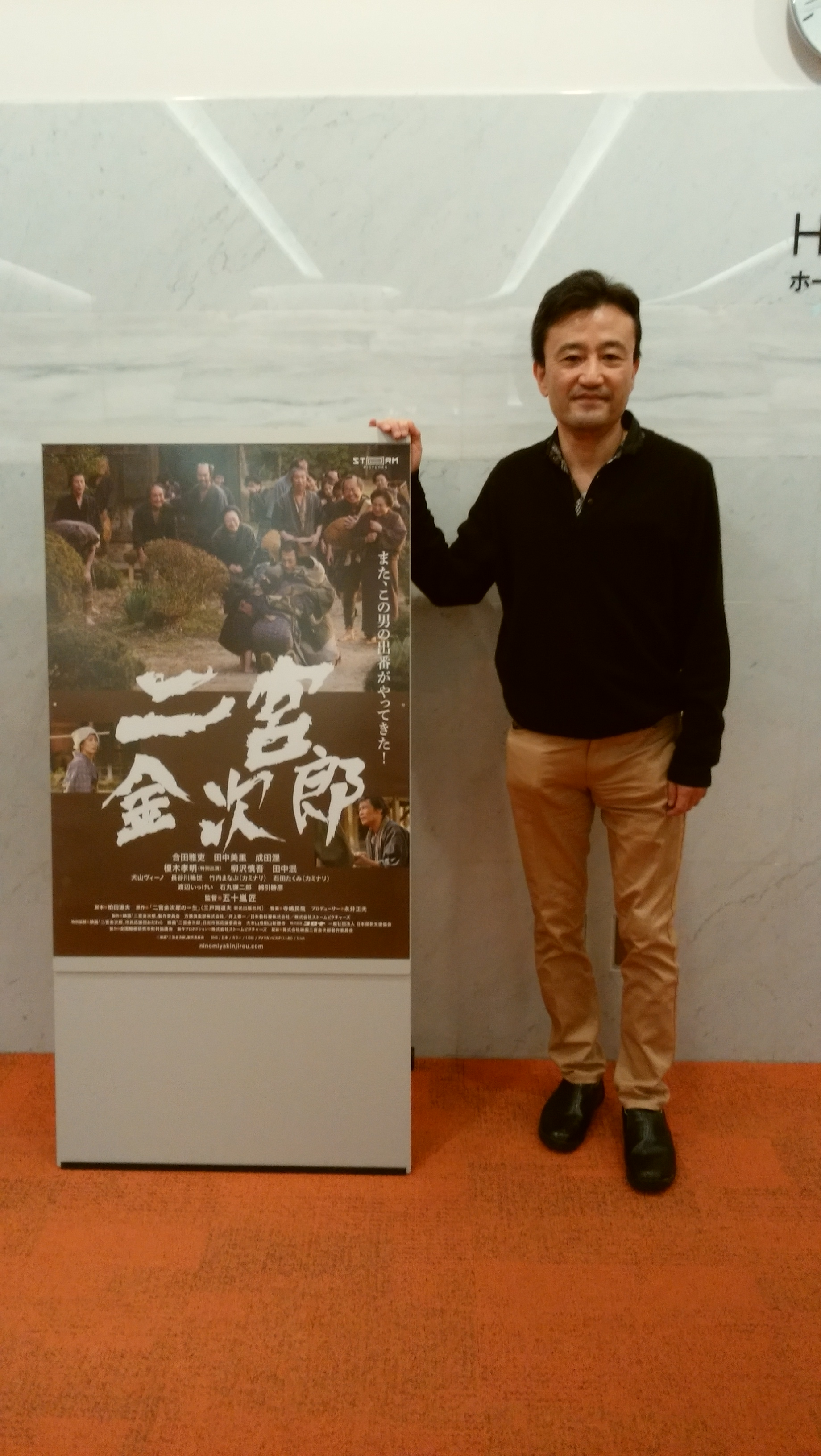 2019年6月9日映画「二宮金次郎」観賞（東京都写真美術館・被写体：小塚郁也）